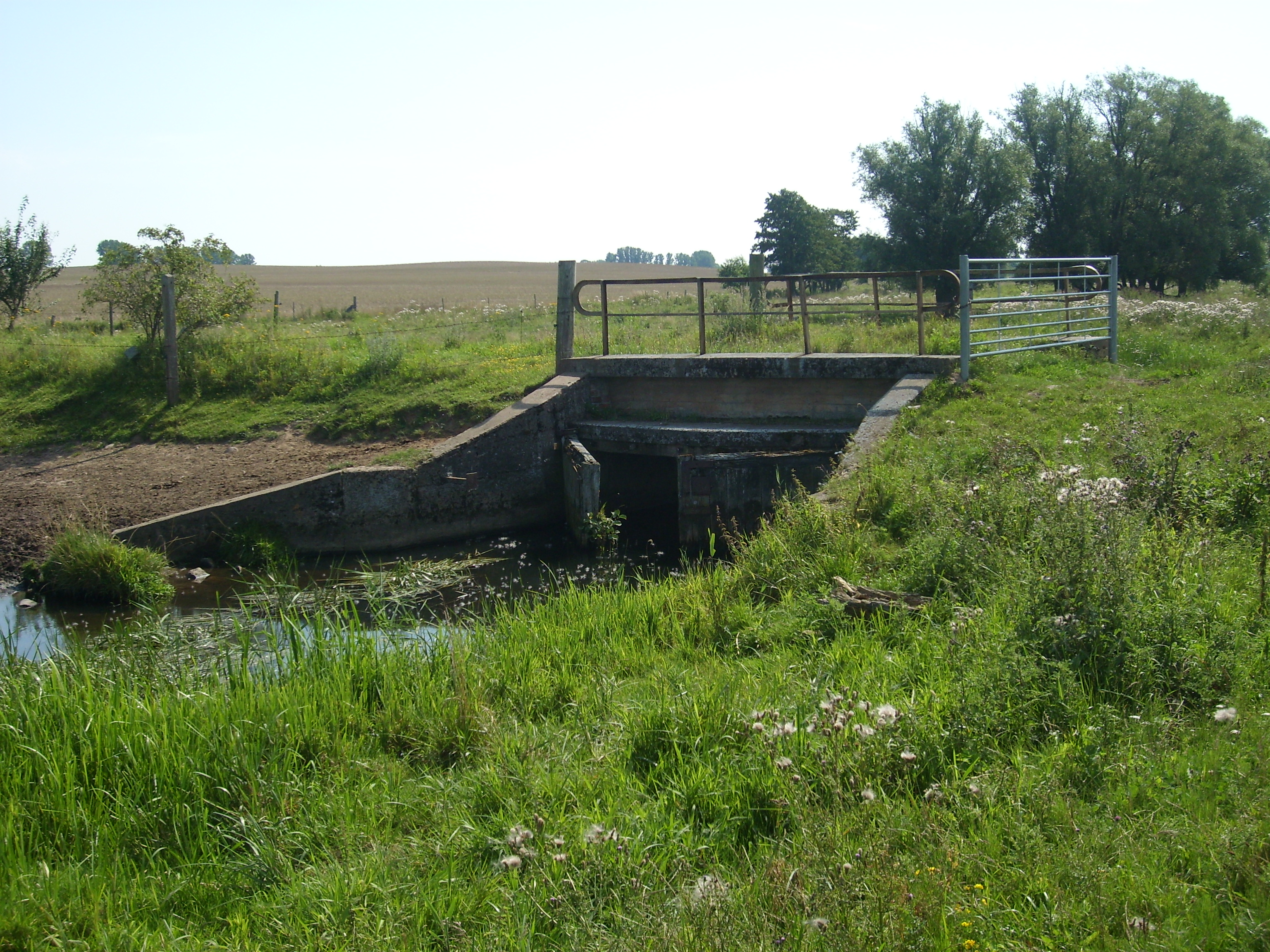 Schleuse kurz vor der Mündung der Ziese in die Dänische Wiek des Greifswalder Boddens. Dieser Teil der Ziese ist der ehemalige Unterlauf des Hanshäger Baches.